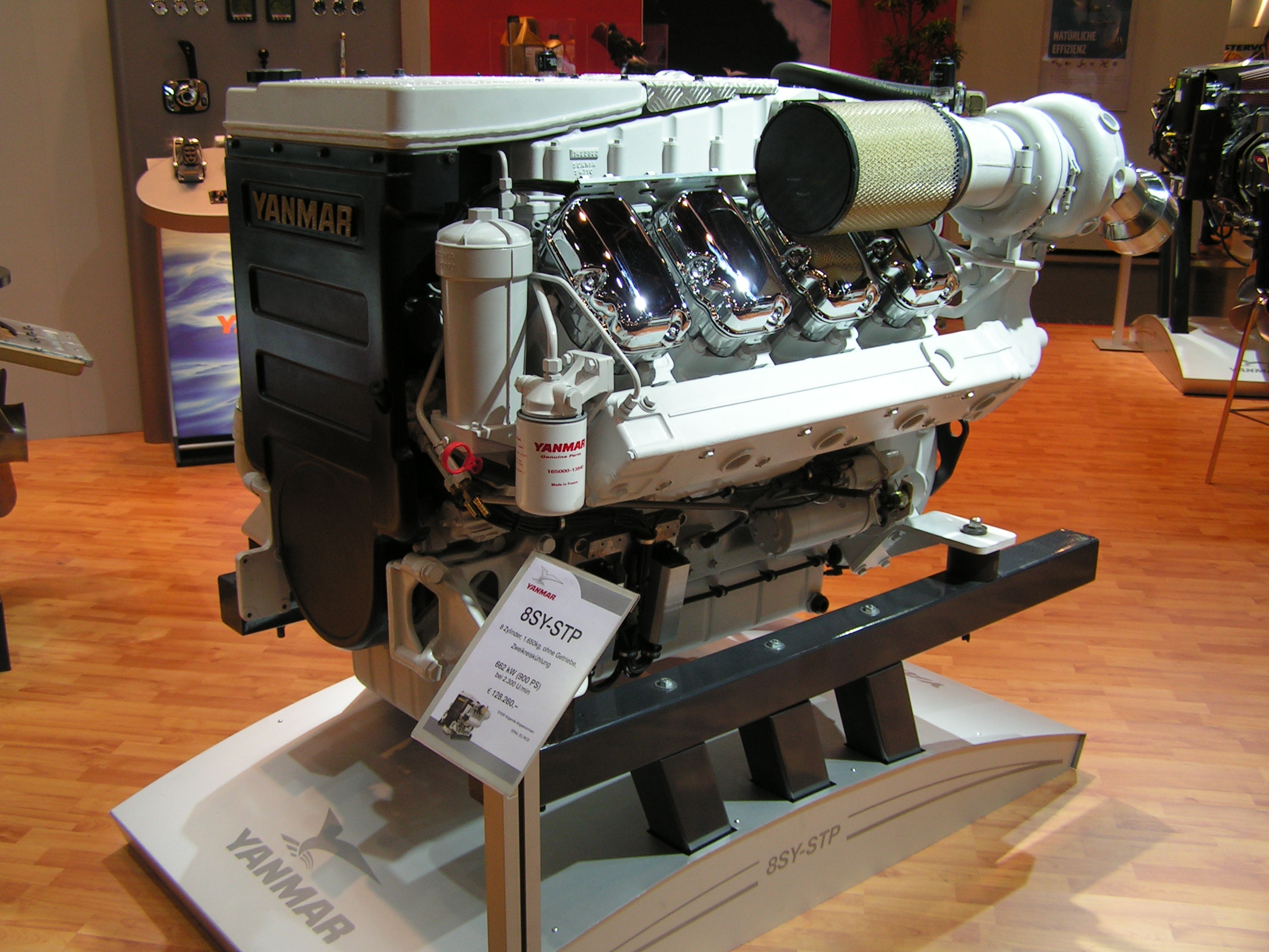 YANMAR-Marine Motor, V8